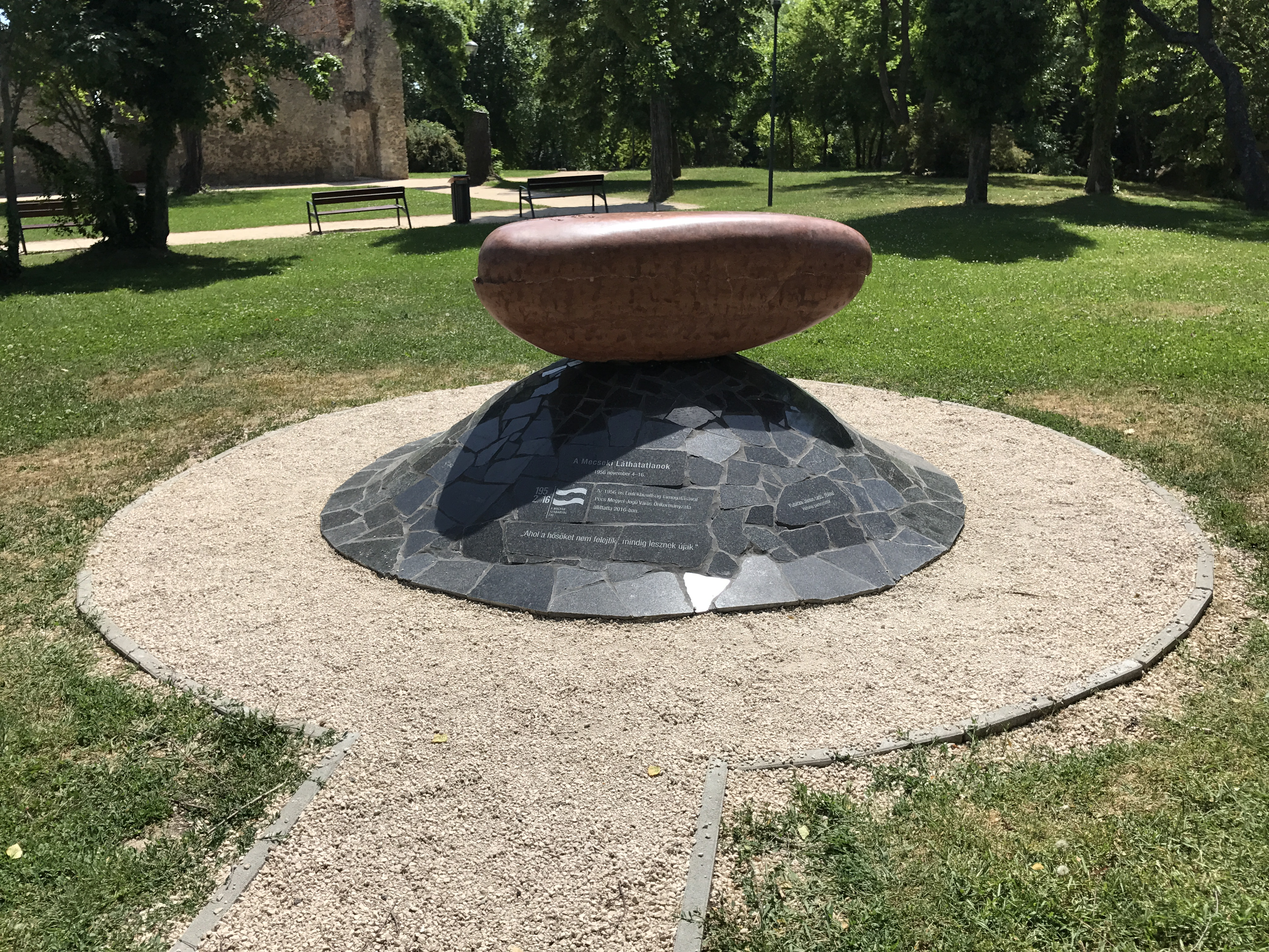 A "Mecseki láthatatlanok" emlékműve, Pécs, Tettye tér (Kuti László alkotása, 2016, anyaga kő)